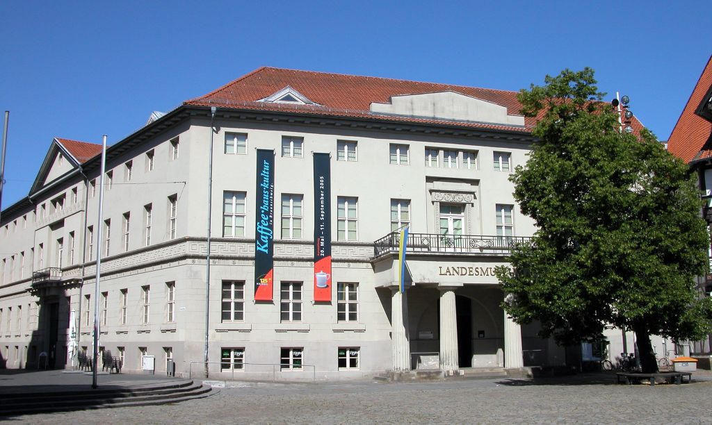 Braunschweig: Braunschweigisches Landesmuseum